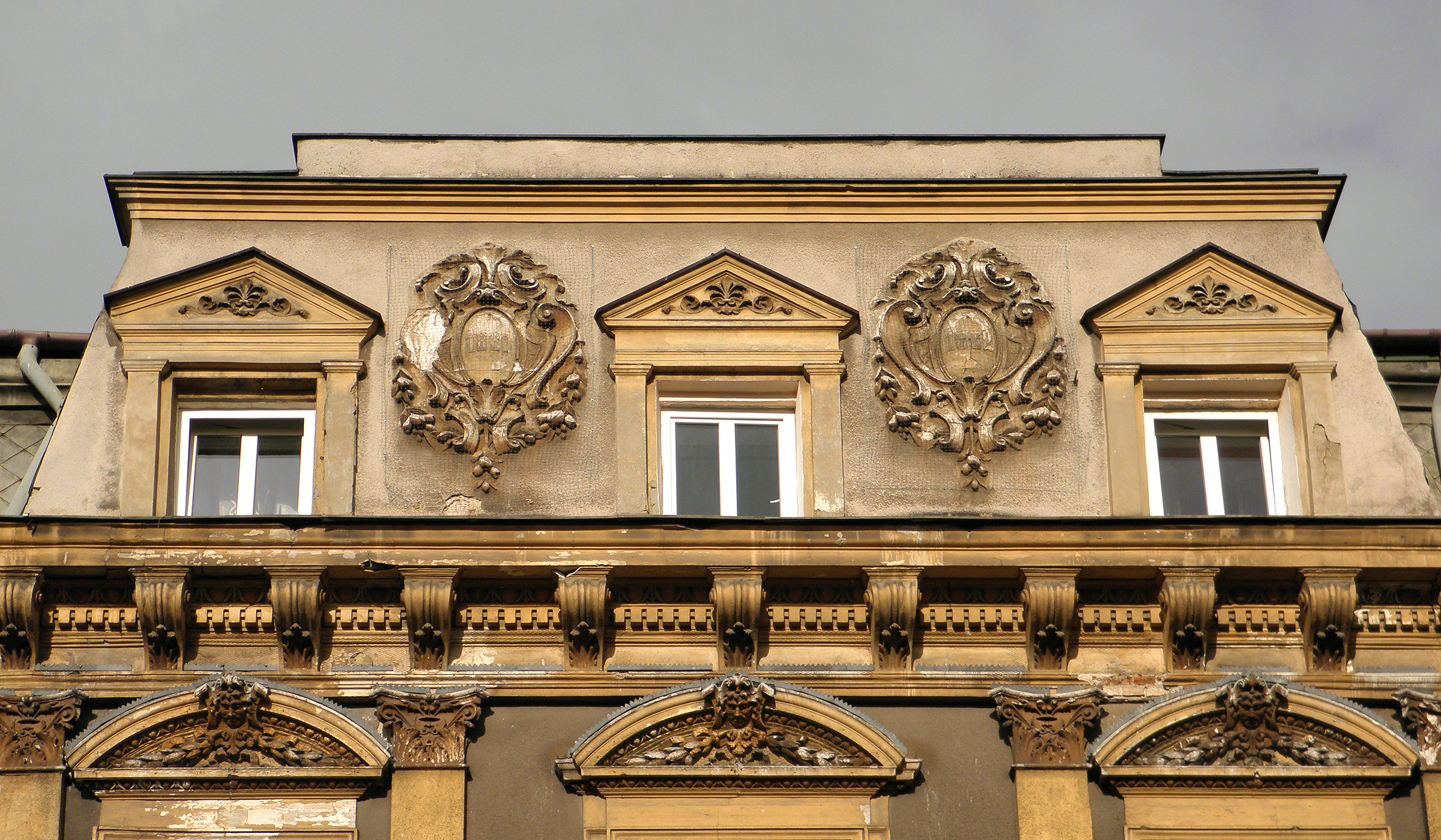 Radom - dawny pałac Karschów, fragment elewacji frontowej.